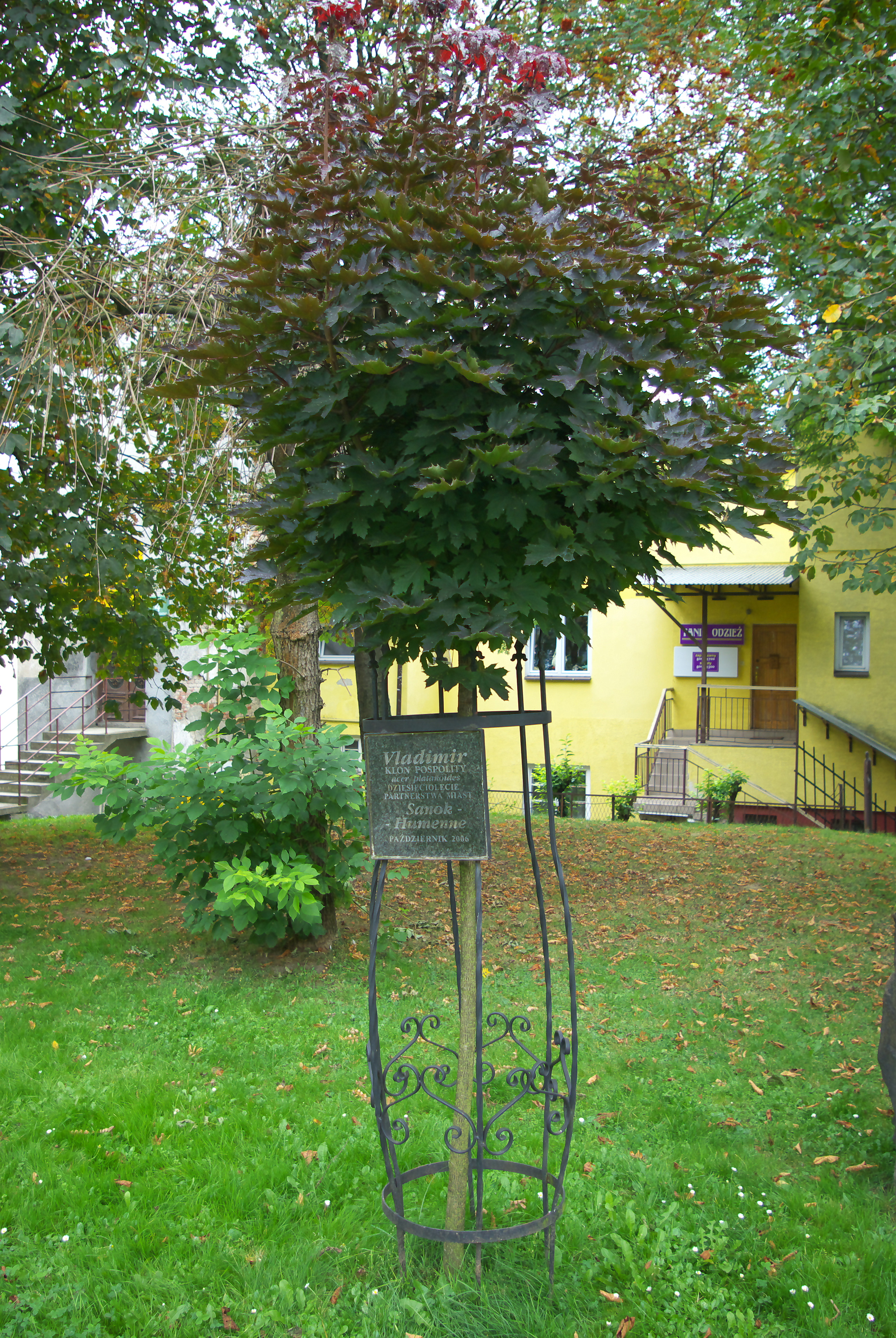 Vladimir Klon Pospolity acer platnoides Dziesięciolecie partnerstwa miast Sanok – Humenne październik 2006